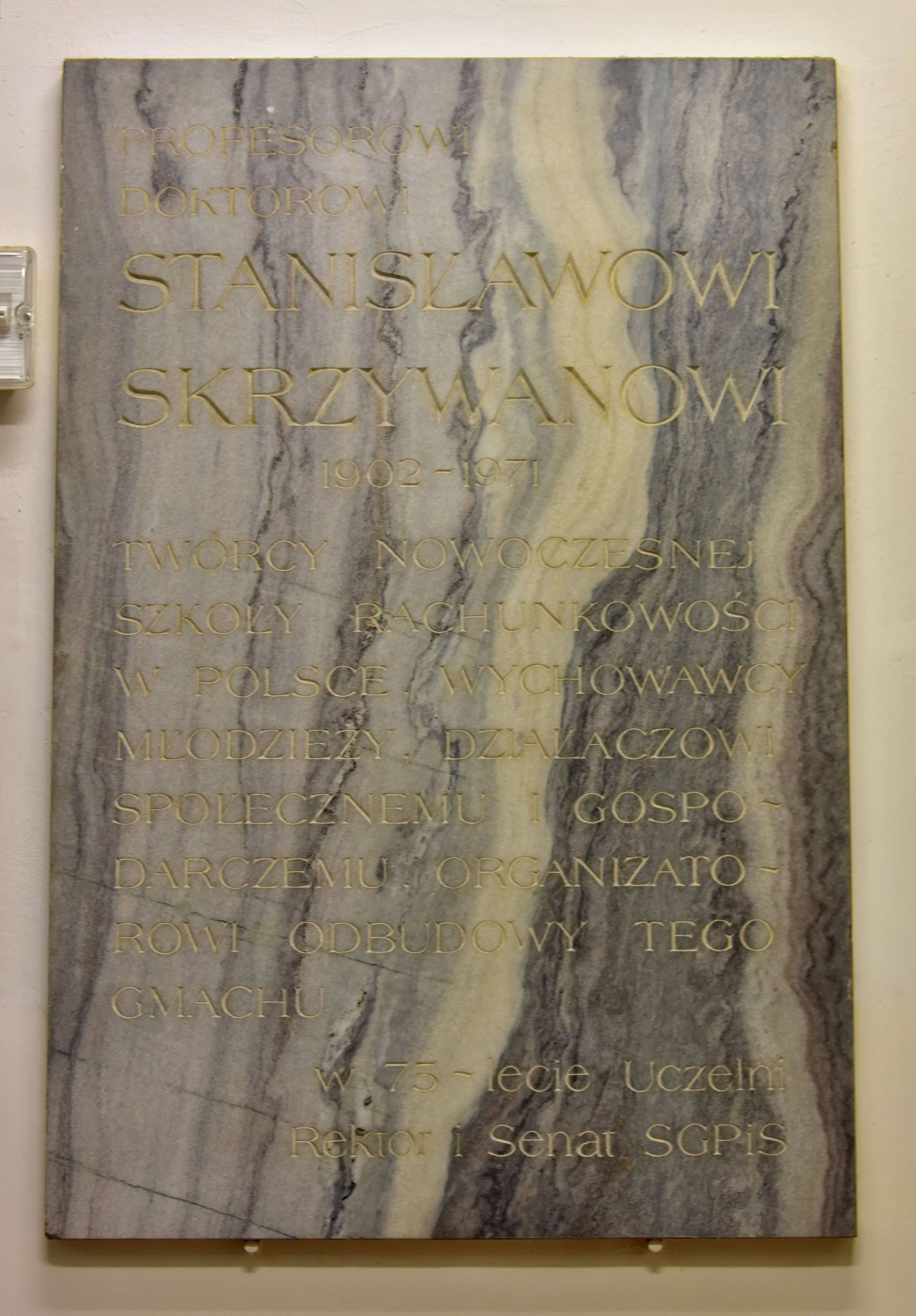 Tablica upamiętniająca prof. Stanisława Skrzywana w budynku "A" Szkoły Głównej Handlowej przy ul. Rakowieckiej 24 w Warszawie